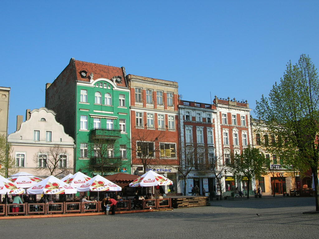 Leszno - Rynek.